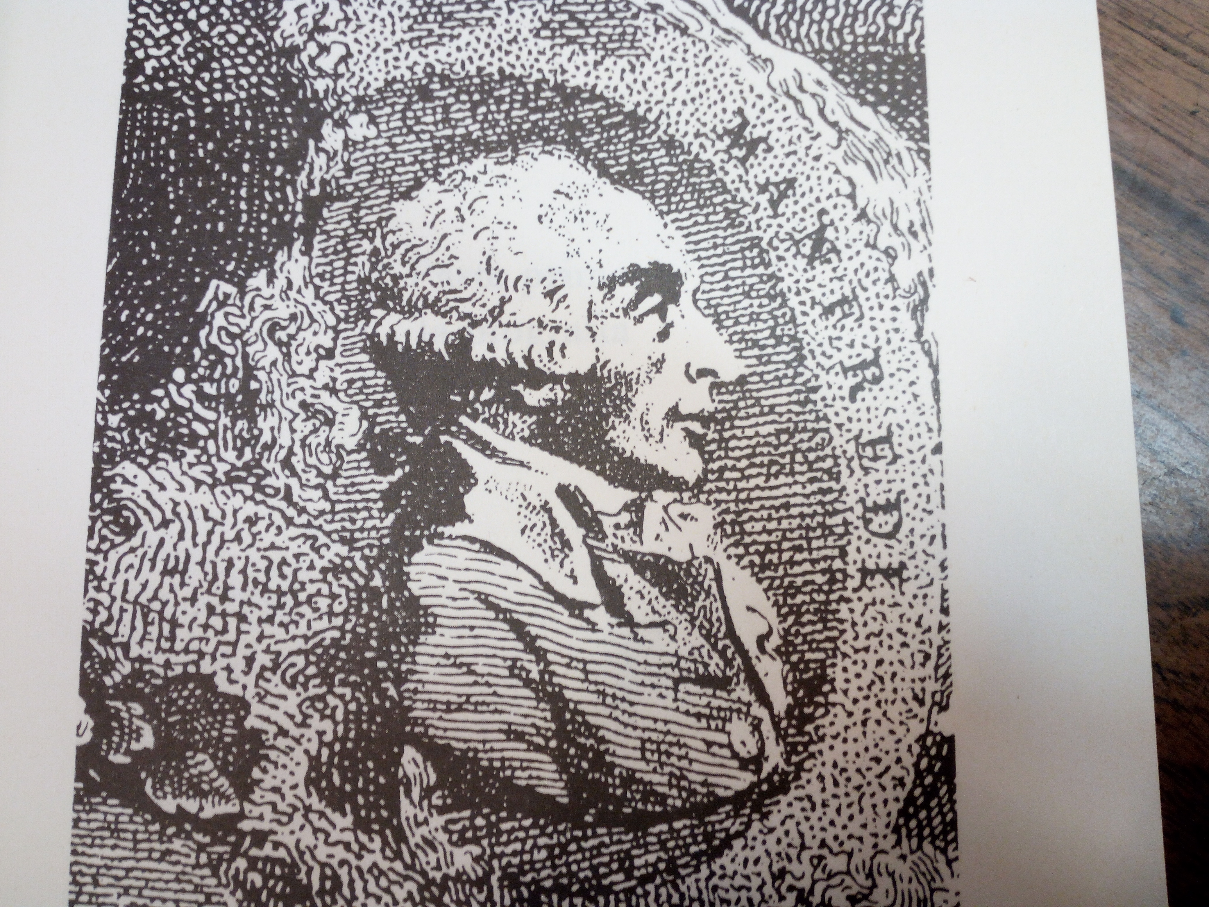 Ritratto di Filippo Manfredi (1731-1777) nella Galleria dei Professori celebri di suono, nel Gabinetto Nazionale delle Stampe di Roma